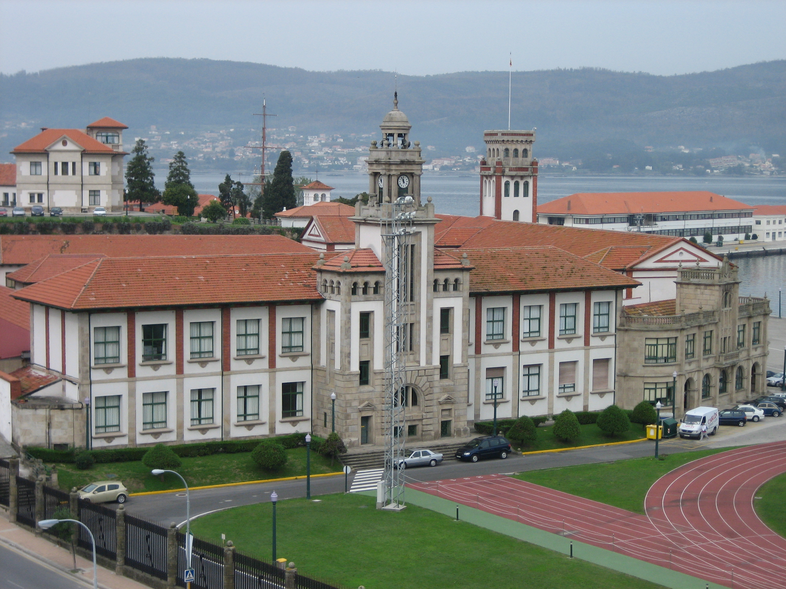 Escuela Naval Militar